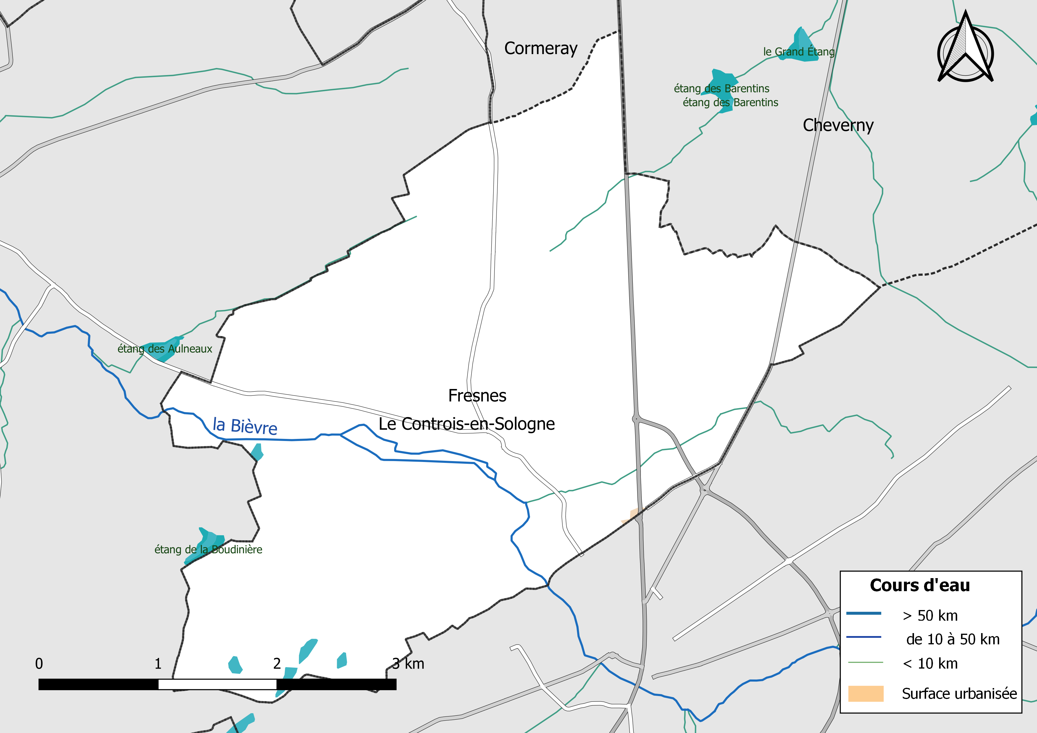 Carte du réseau hydrographique de la commune de Fresnes (Loir-et-Cher) (France).